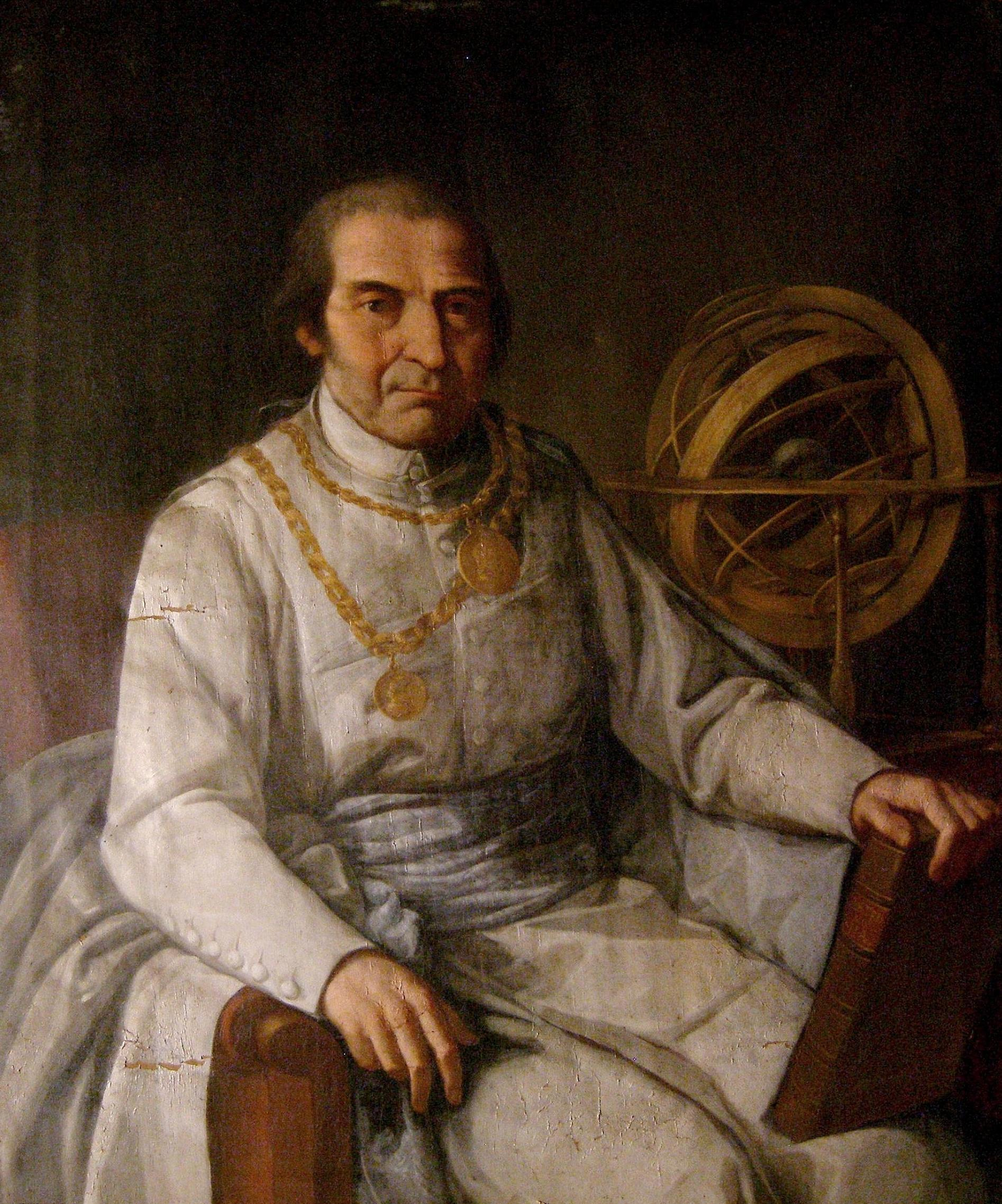 Alois Martin David, rektorský portrét s almirální sférou, rektorským řetězem a záslužnou medailí s řetězem a křížem císaře Františka I., (autor ?, asi Praha 1816, olej na plátně (reprofoto Jiří Schierl, originál obrazu ve sbírce Kanonie premonstrátů Teplá).